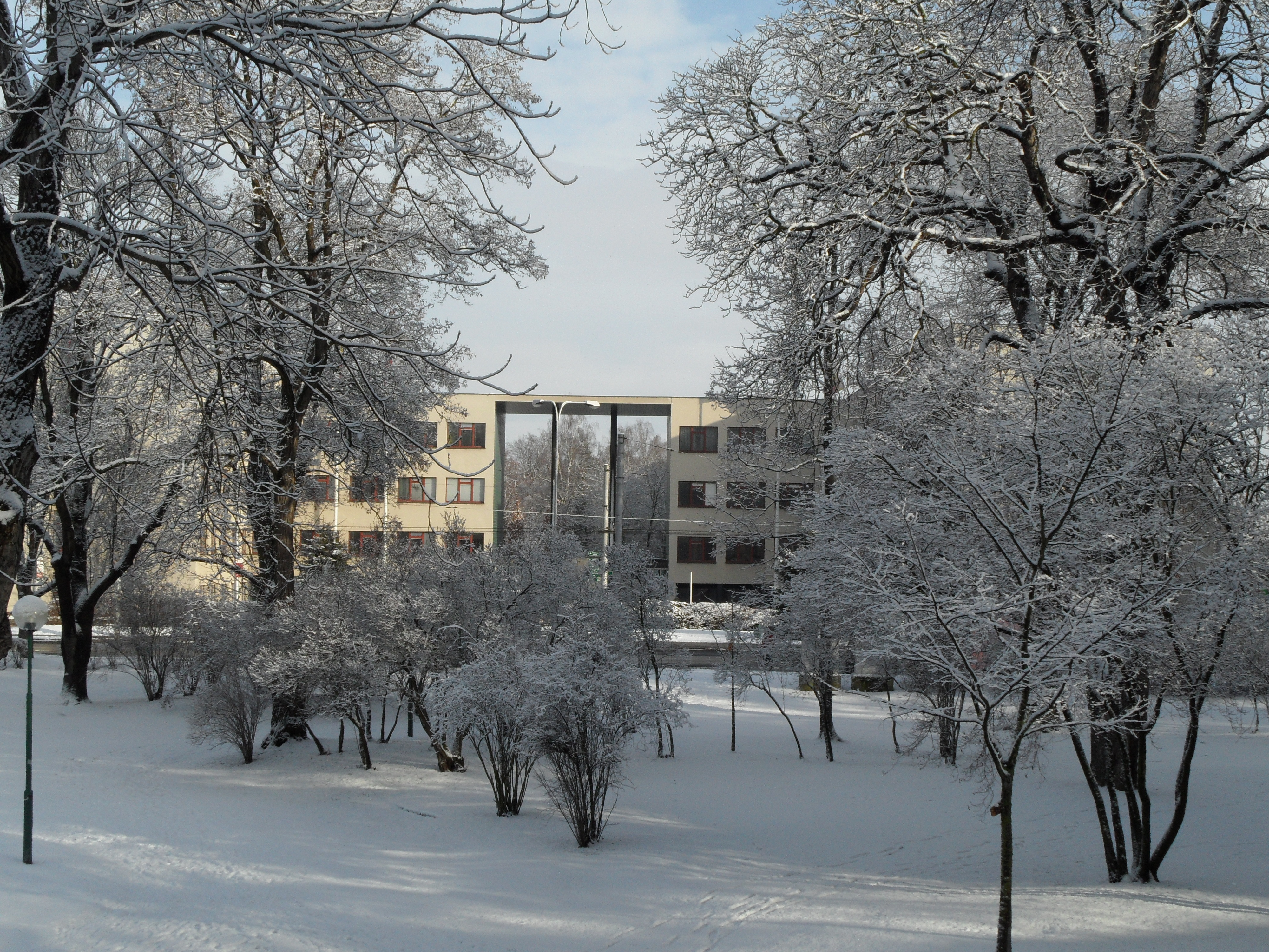 Magistrát města